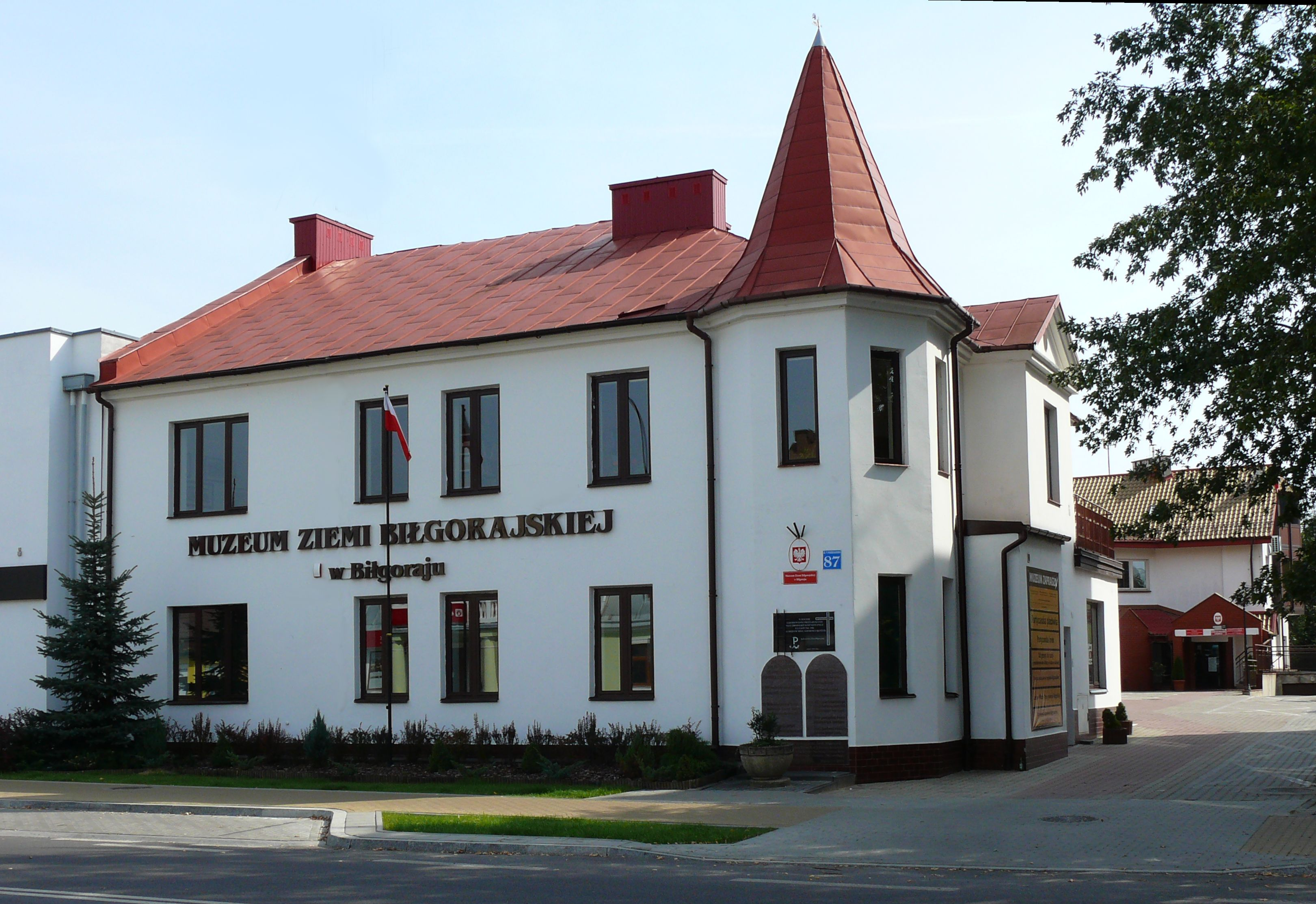 Muzeum Ziemi Biłgorajskiej w Biłgoraju